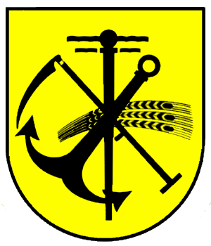 Gemeindelogo Mittelherwigsdorf